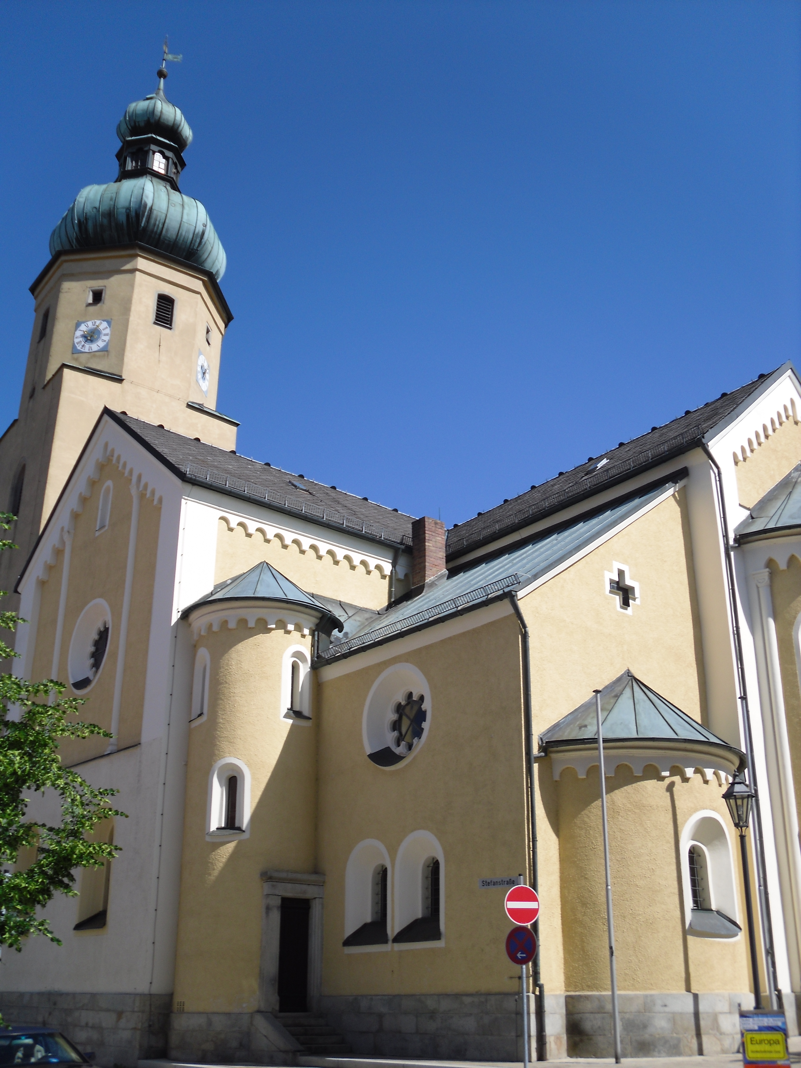 Katholische Stadtpfarrkirche St. Stephan im Jahr 2009